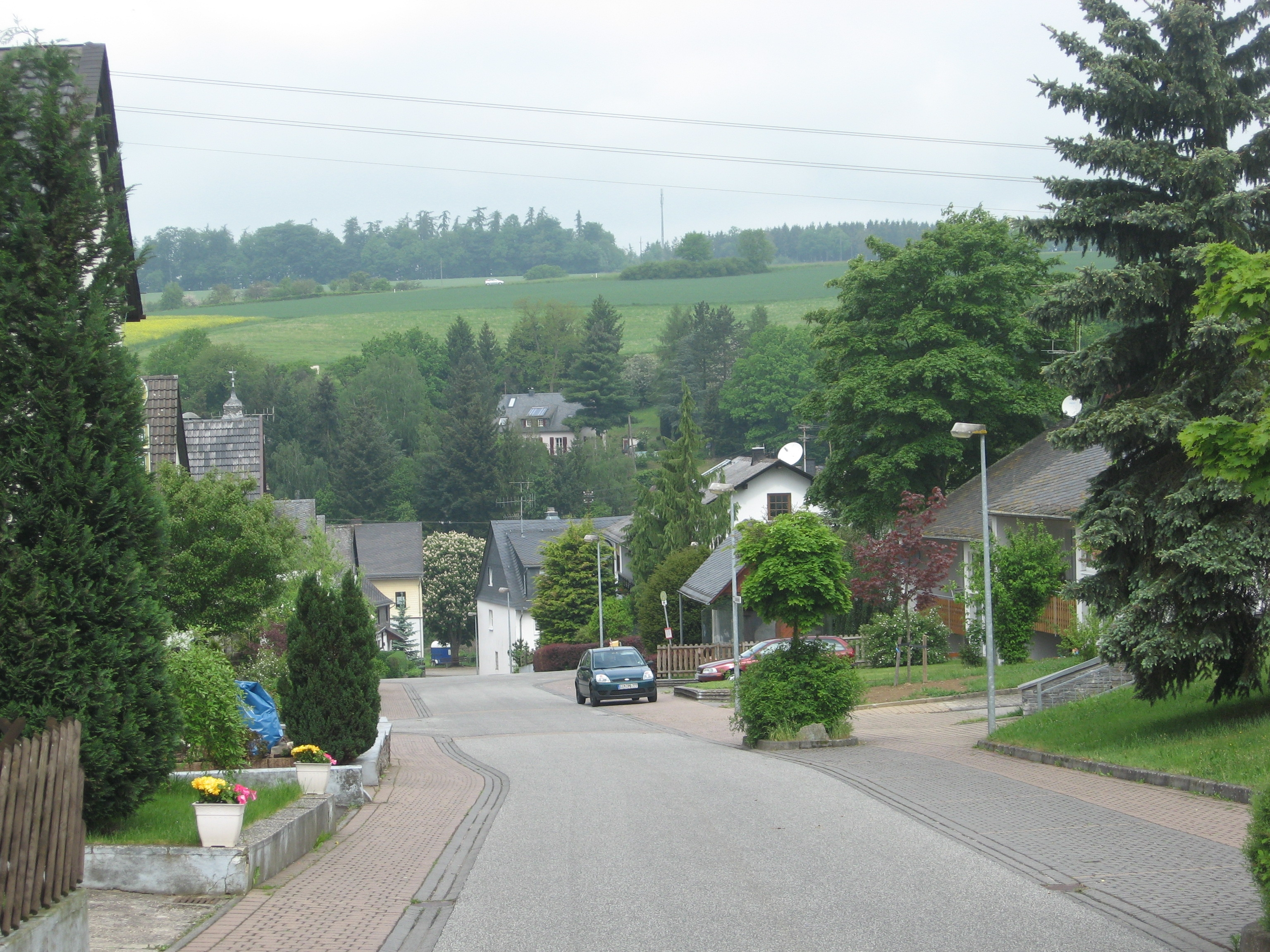 Chapel Tiefenbach (Hunsrück)